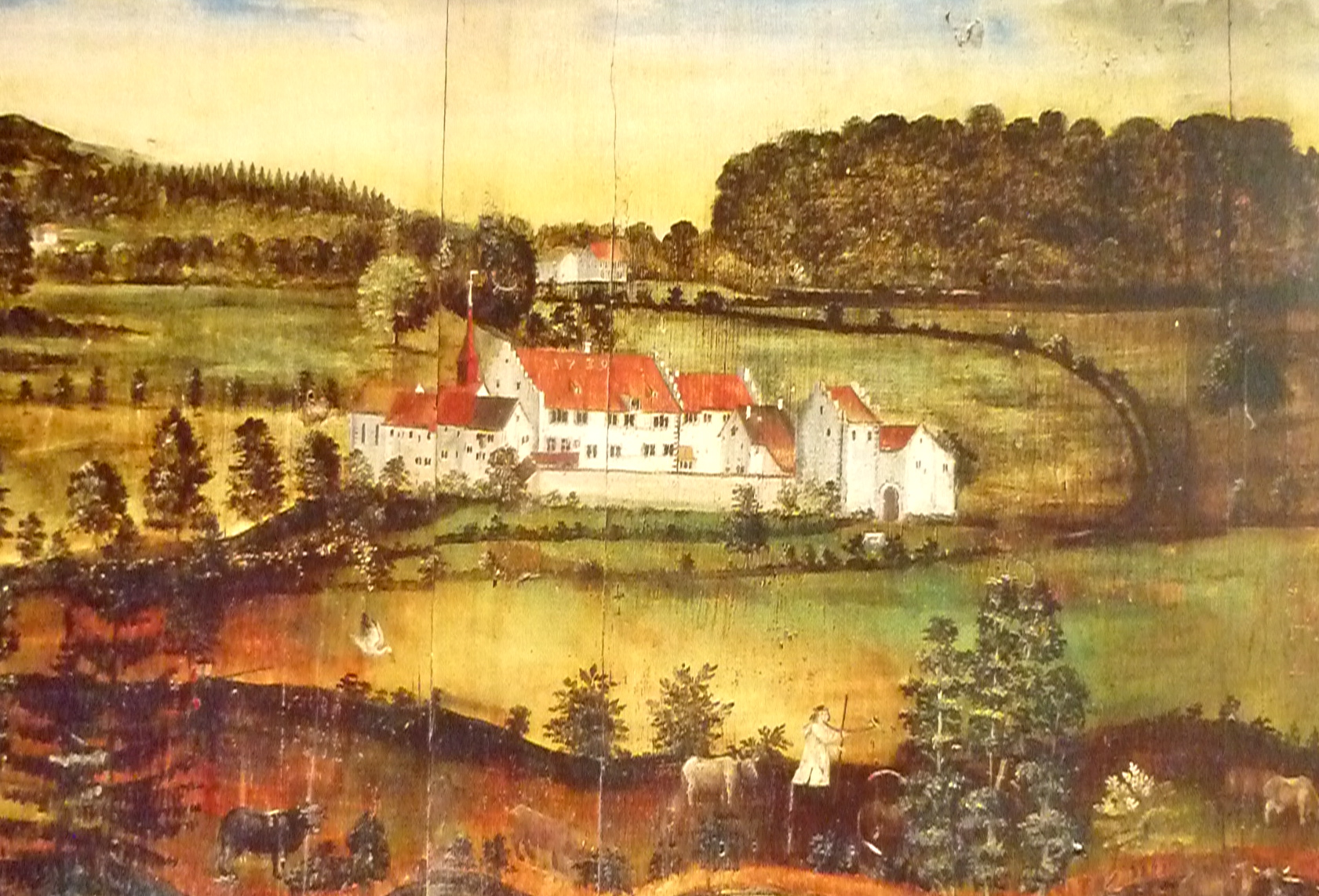 Ritterhaus Bubikon: Wandbild von Stöffi Kuhn dem Jüngeren (1731 - 1792), um 1770